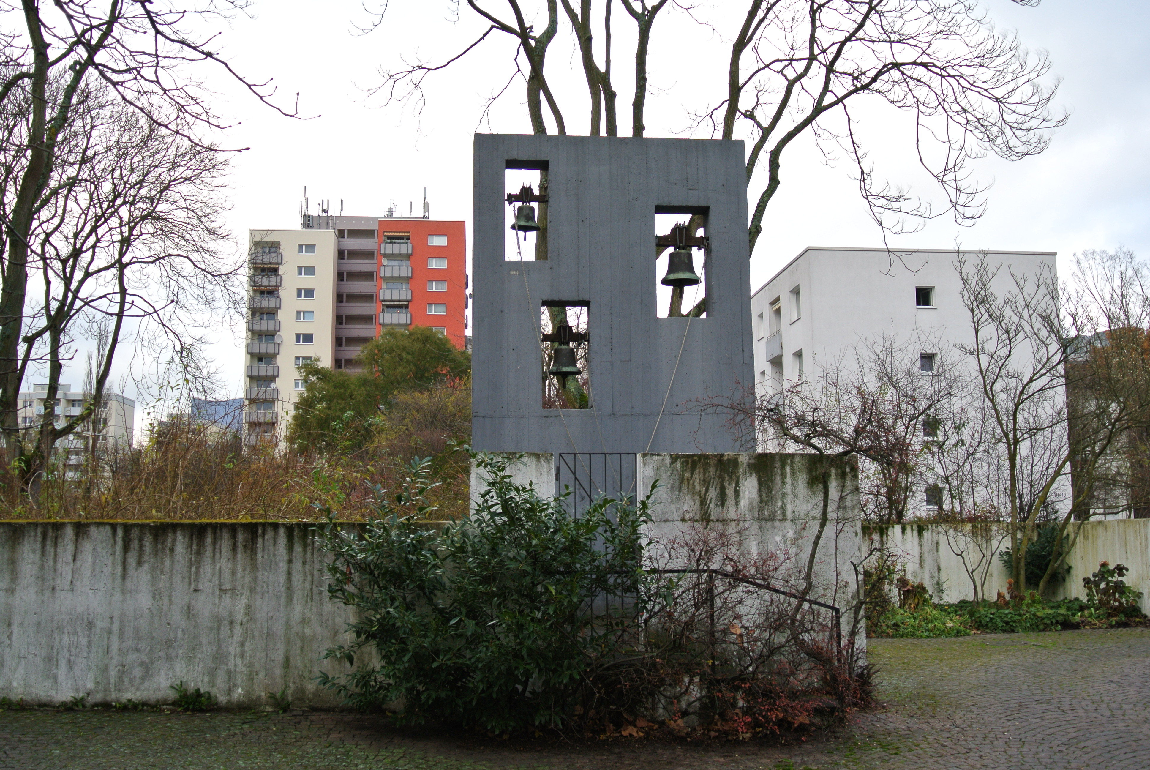 Cantate-Domino-Kirche in der Frankfurter Nordweststadt von den Architekten Walter Schwagenscheidt und Tassilo Sittmann 1963 bis 1966 errichtet, Glockenwand